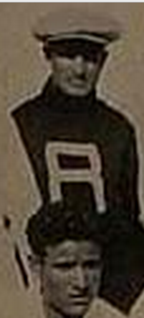 Jesús Bermúdez en la Copa Mundial de Fútbol de 1930.